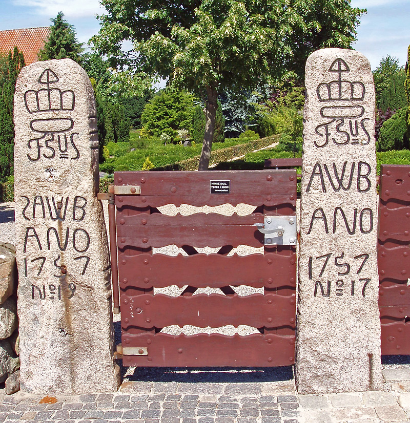 Vildtbanesten ved Hundslund Kirke, Hads Herred, Århus Amt, Denmark